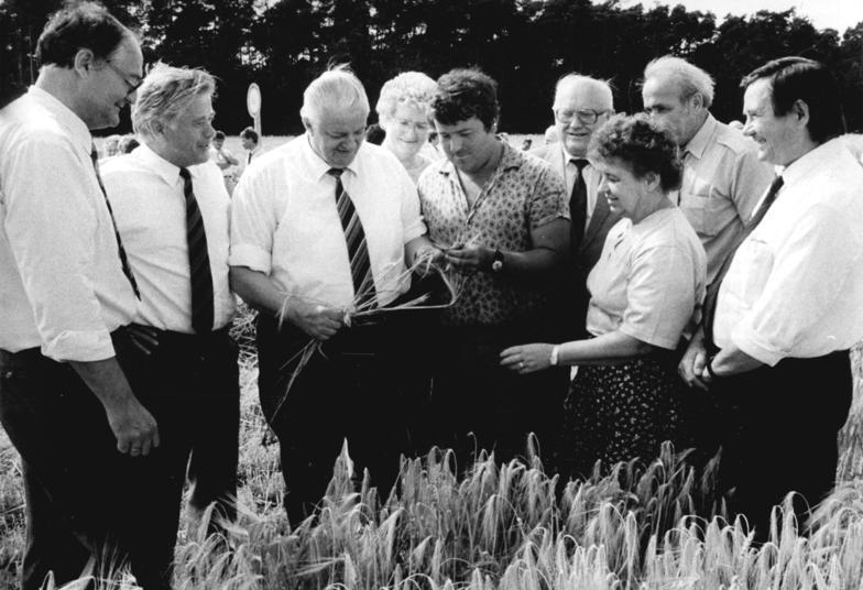 LPG Seyda, Ernte, Besuch von ZK-Mitgliedern ADN-ZB Zimmermann mx-28.6.89- Bez. Cottbus: Ernte- Den Beginn der Getreideernte in der Kooperation Seyda, Kreis Jessen, verfolgte Werner Krolikowski (3.v.l.), Mitglied des Politbüros und Sekretär des ZK der SED, gemeinsam mit den Kandidaten des Politbüros des ZK der SED, Margarete Müller (3.v.r.), Leiterin der Agrar-Industrie-Vereinbarung Friedland, und Werner Walde (2.v.l.), 1. Sekretär der Bezirksleitung Cottbus, sowie dem Minister für Land-, Forst- und Nahrungsgüterwirtschaft, Bruno Lietz (4.v.r.). L.: Dr. Dieter Mühlbach (DBD), Vorsitzender der LPG Pflanzenproduktion Seyda und Vorsitzender des Kooperationsrates, 4.v.l.: Mähdrescher-Fahrer Lothar Danneberg